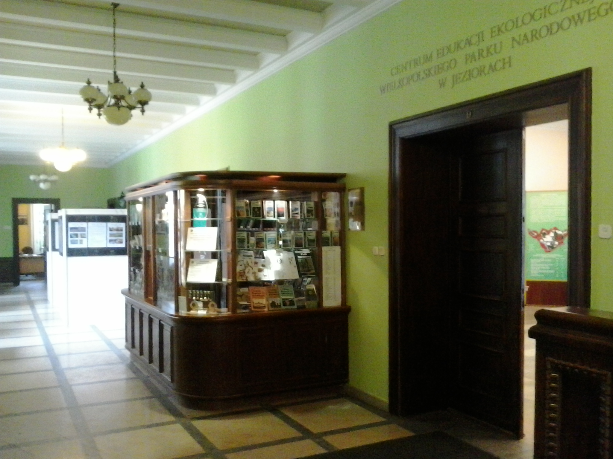 Dyrekcja i Muzeum Wielkopolskiego Parku Narodowego w Jeziorach.